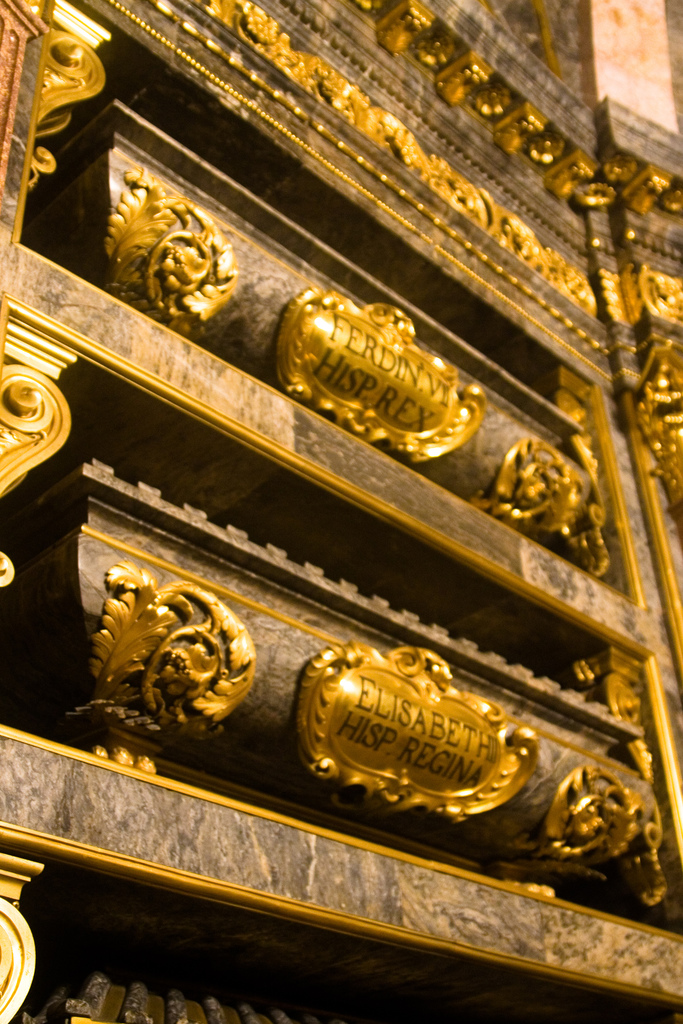 Sepulcros en el Panteón de Reyes del monasterio de San Lorenzo de El Escorial. Y de arriba a abajo corresponden a los siguientes monarcas: Fernando VII de España (1784-1833), hijo de Carlos IV y de María Luisa de Parma. Isabel II de España (1830-1904), hija del anterior y de María Cristina de Borbón-Dos Sicilias.